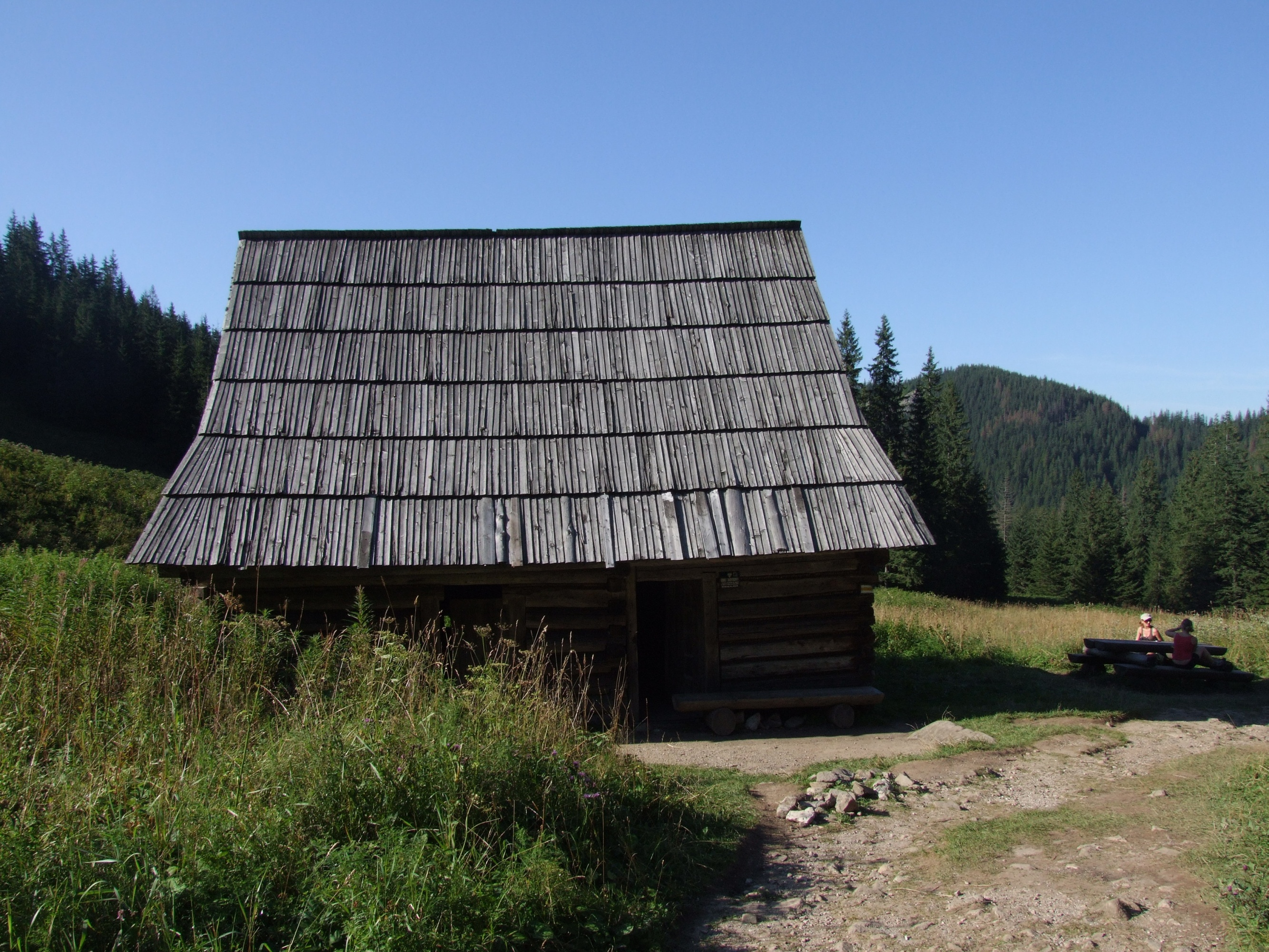 Szałas na Polanie Olczysko (zabytek nr A-264/78)